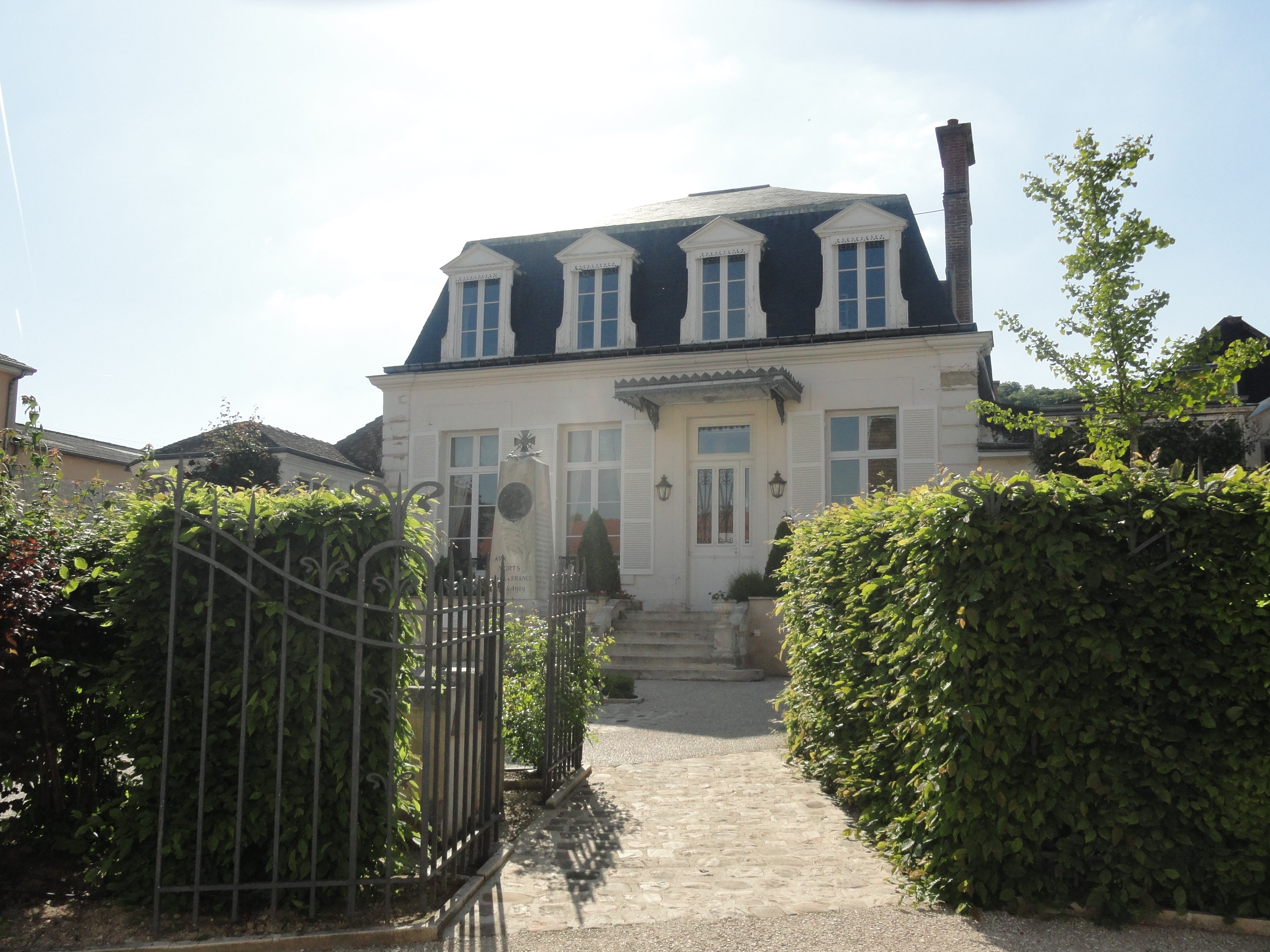 La mairie d'Avenay-Val-d'Or (Marne, France) et le monument aux morts.